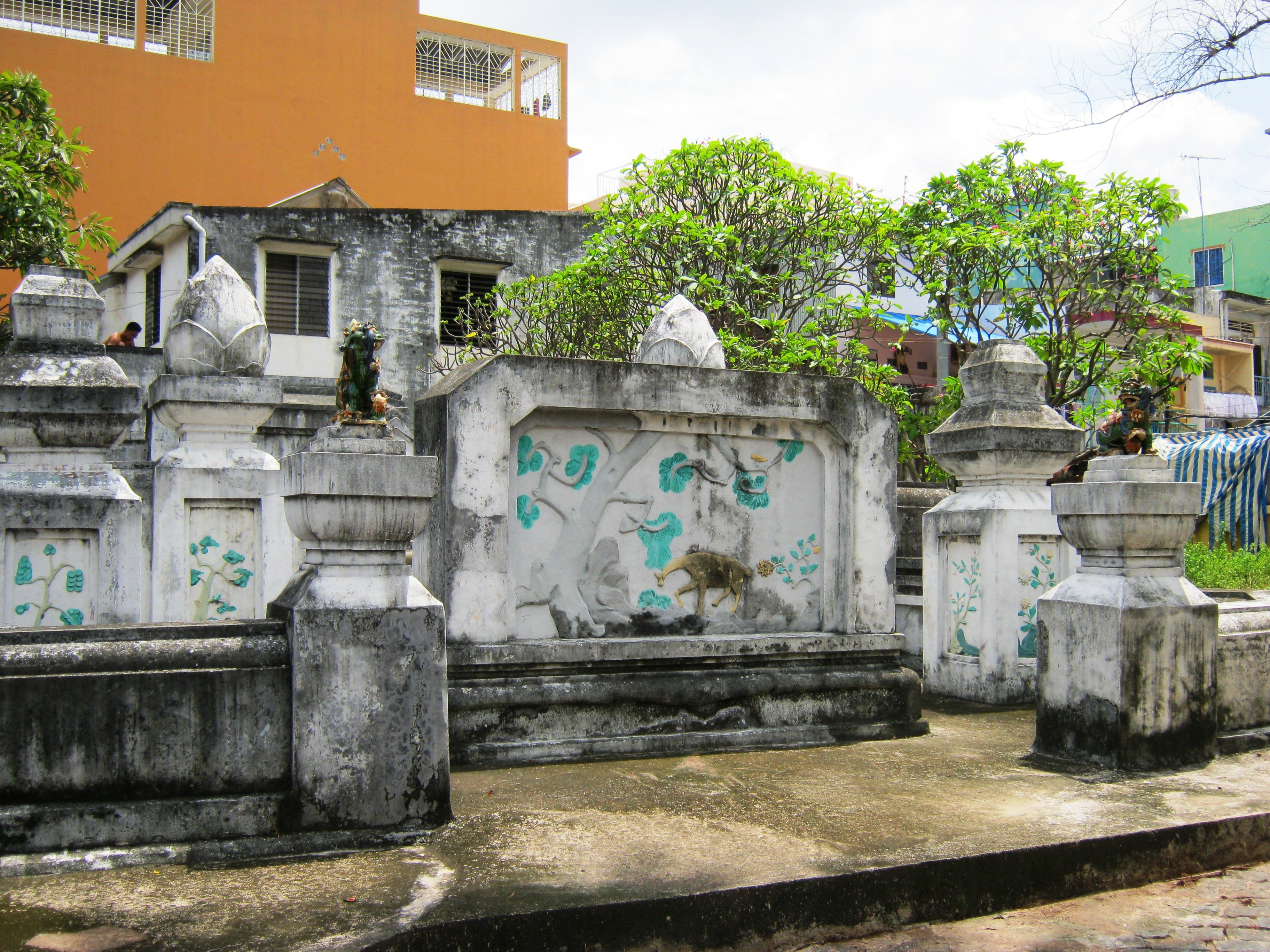 Mộ cô hầu nằm kề bên khu Lăng Ông Bà Chiểu ở quận Bình Thạnh, Thành phố Hồ Chí Minh, Việt Nam.